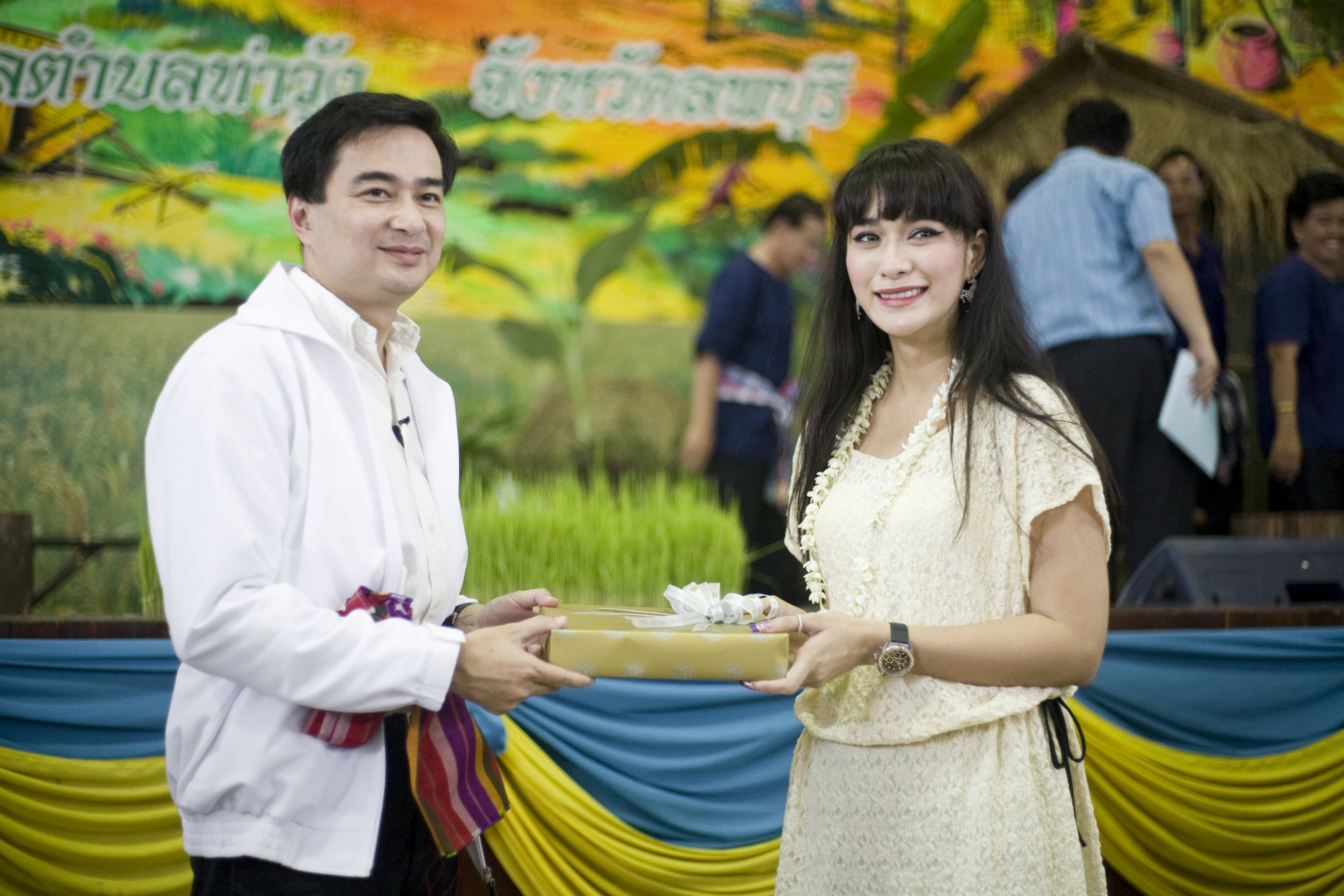 นางมา นายกรัฐมนตรีบันทึกเทปรายการ “เชื่อมั่นประเทศไทยกับนายกฯ อภิสิทธิ์” ณ อาคารศูนย์ฝึกอาชีพเทศบาลตำบลท่าวุ้ง จังหวัดลพบุรี 12กันยายน2552 (The Official Site of The Prime Minister of Thailand Photo by พีรพัฒน์ วิมลรังครัตน์)